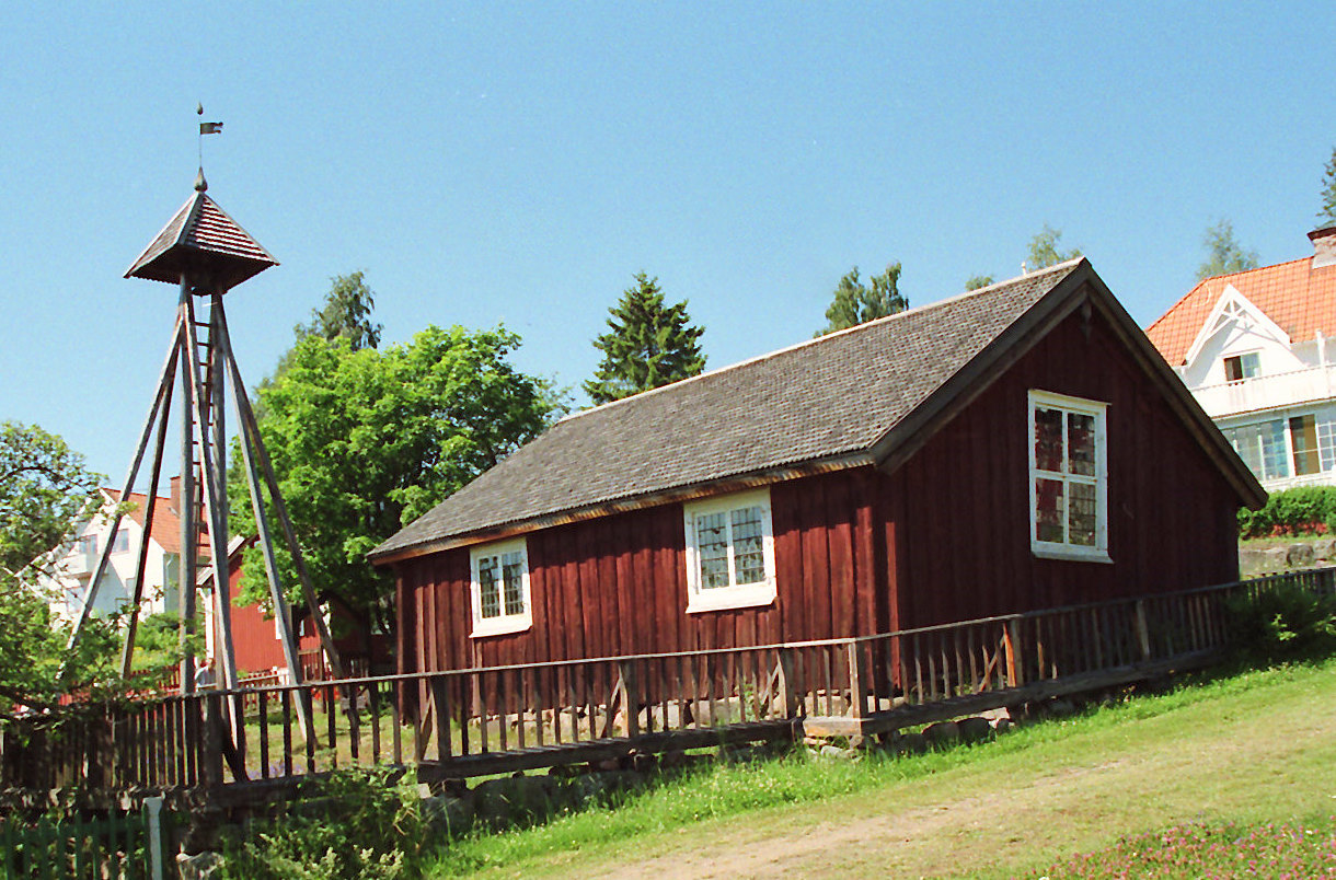 Ulvö kapell - exteriör